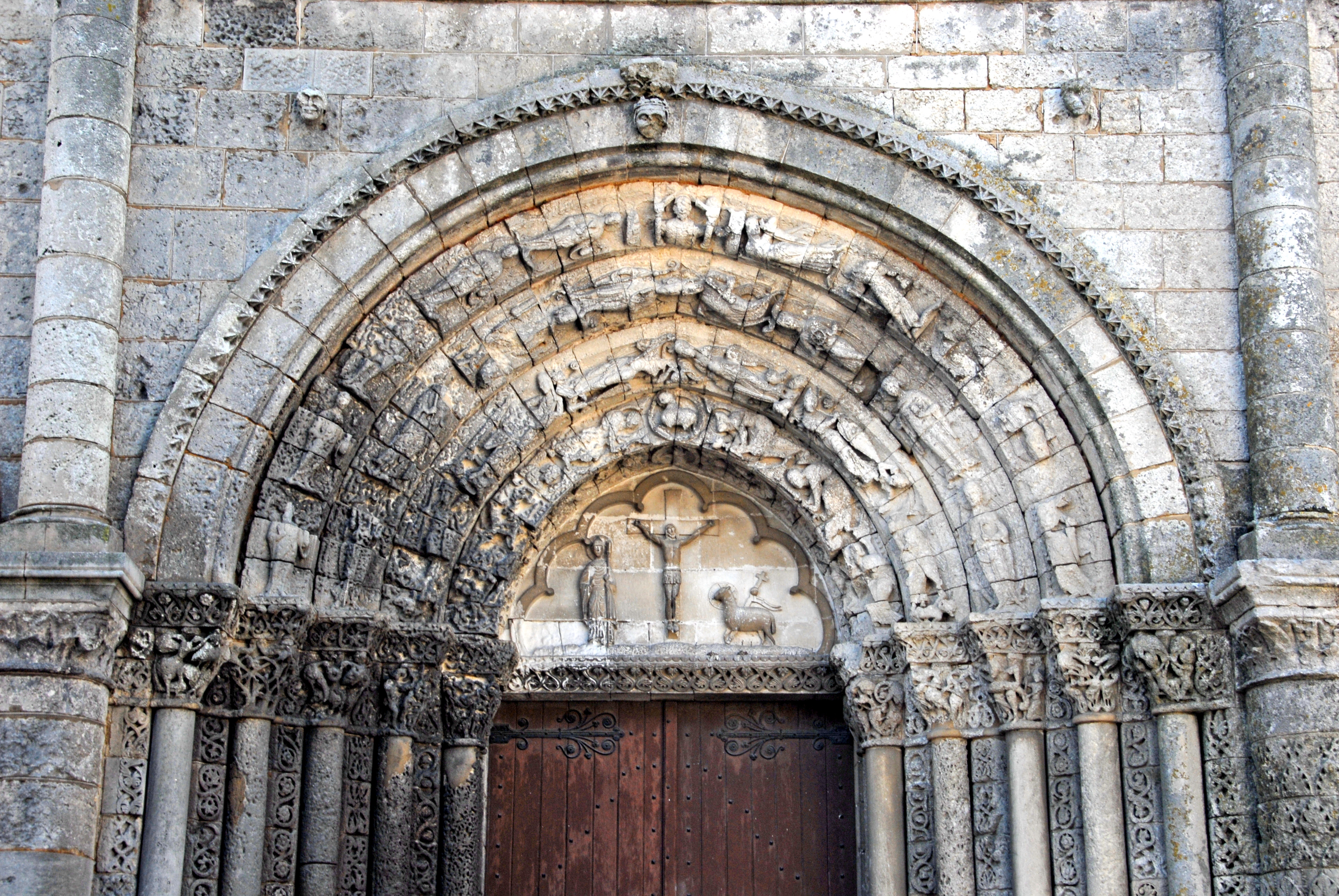 St-Pierre de Pont-l’Abbé-d’Arnoult (17), Archivolten-Hauptportal